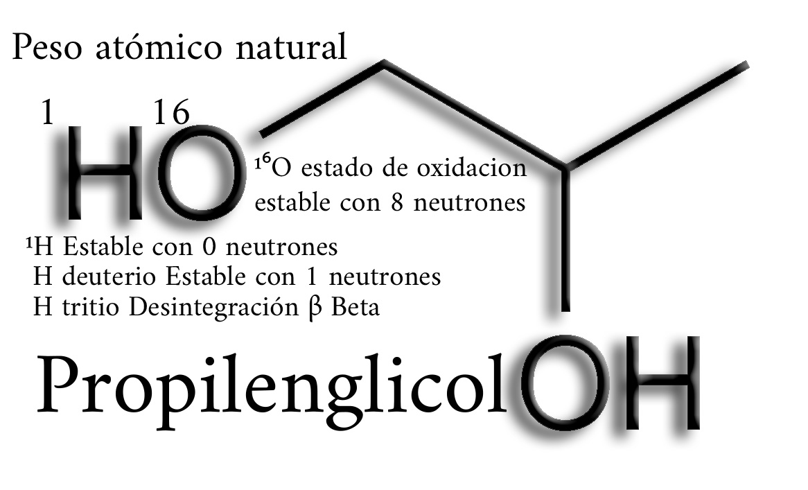 Síntesis básica del la Formula